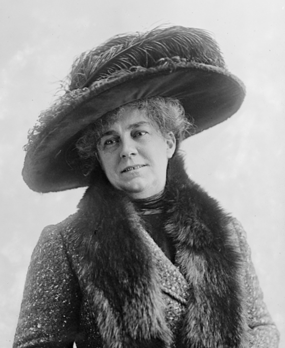 Opera singer Sigrid Wolf-Schöller in 1913.